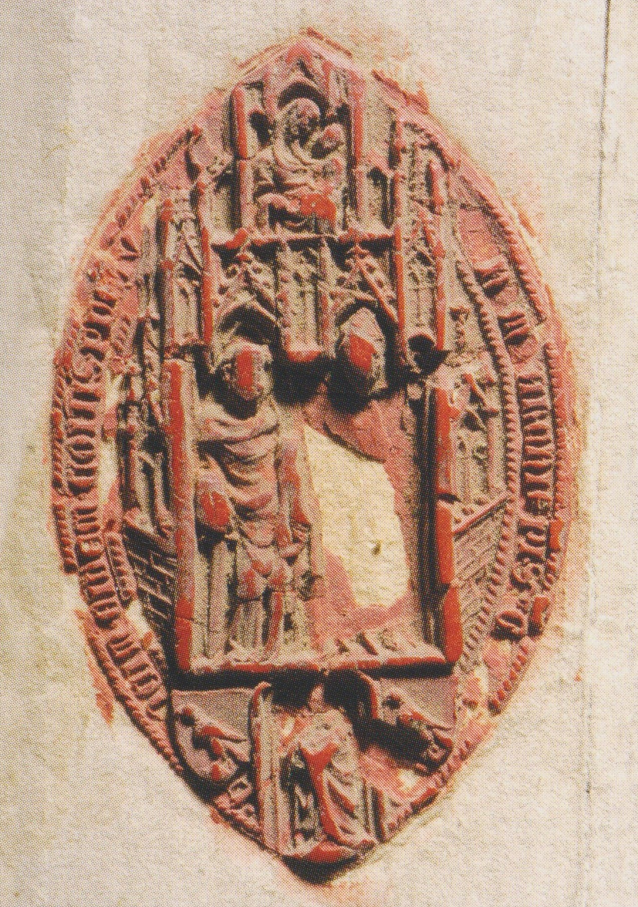 Telegdi Tamás esztergomi érsek pecsétje, 1367